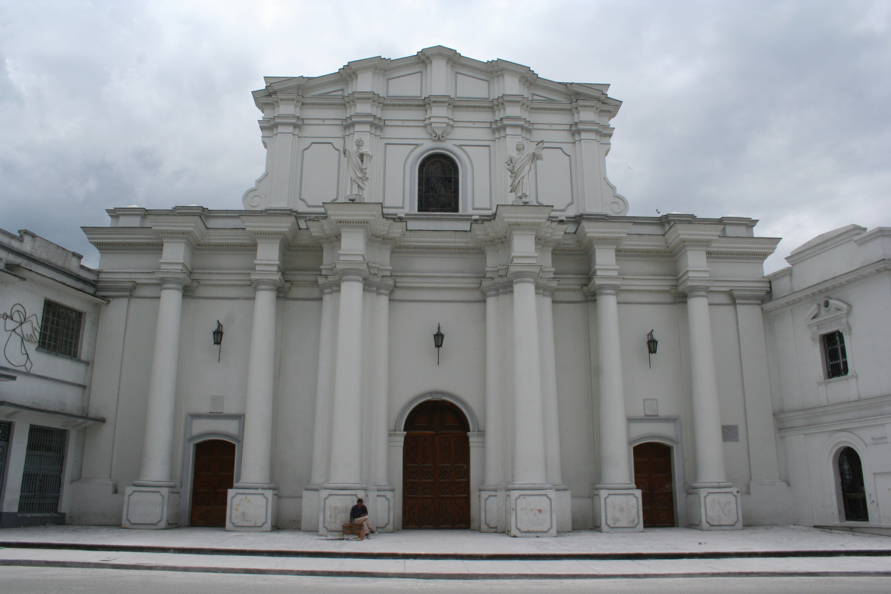 Catedral Basílica de Nuestra Señora de la Asunción de la ciudad de Popayán, Colombia.